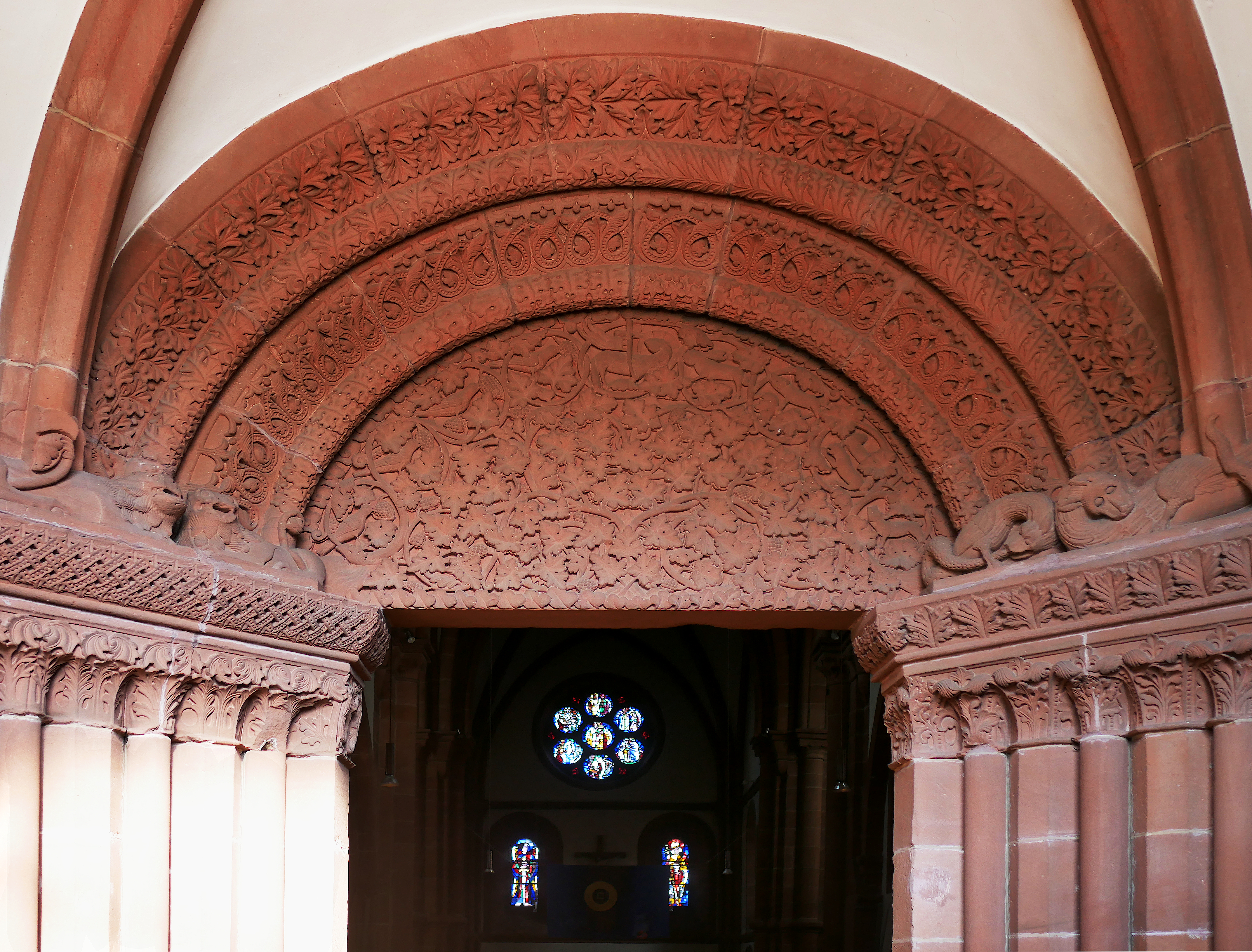 Ehemalige Prämonstratenserinnenklosterkirche St. Norbert in Enkenbach (Pfalz) - Romanischer Tympanon über dem Haupteingang, heute durch einen Vorbau wettergeschützt